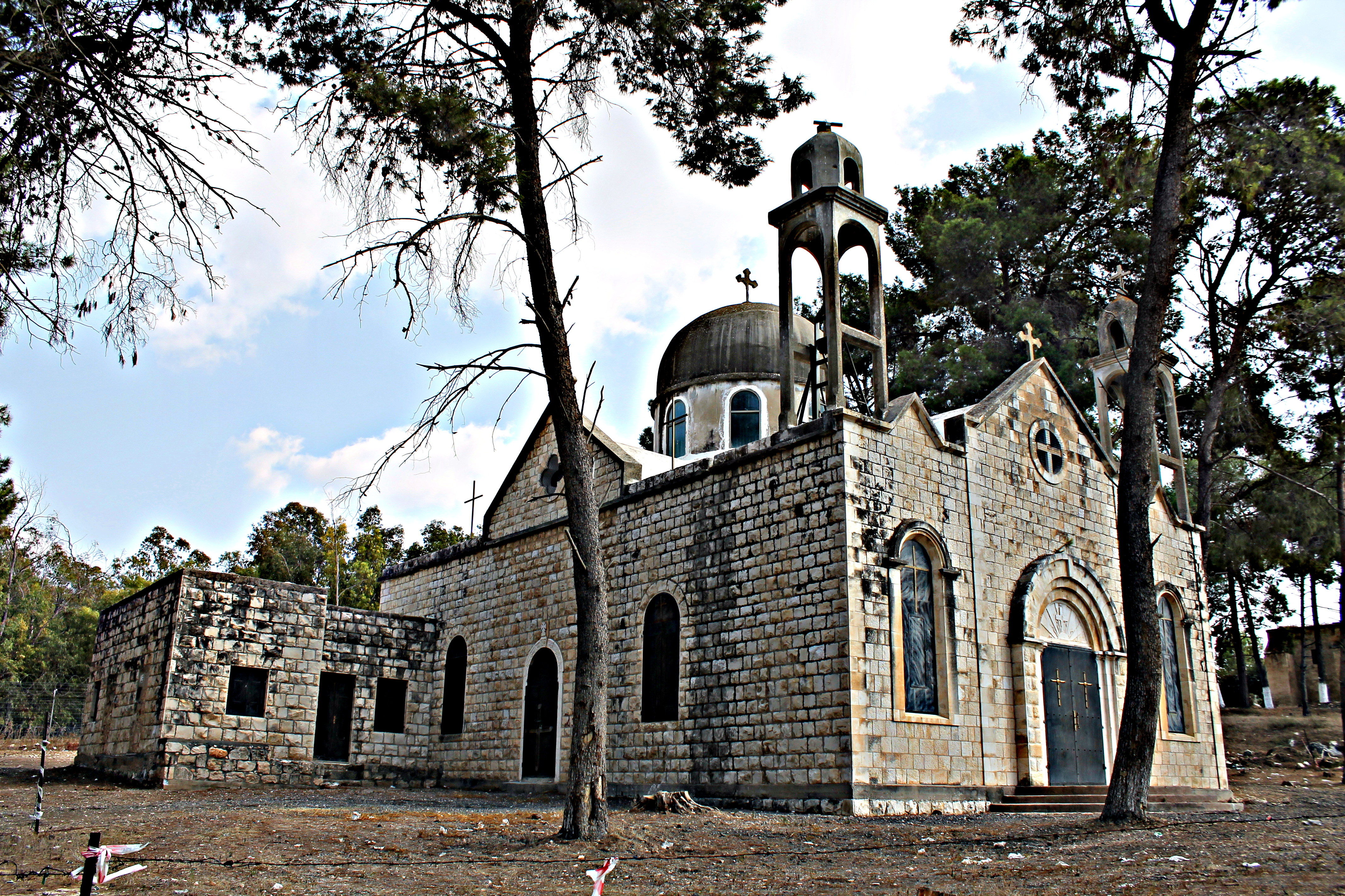 מעלוּל היה כפר ערבי שהתקיים בשוליו הצפוניים של עמק יזרעאל, על שלוחה מערבית של הרי נצרת, כ-6 ק"מ דרומית-מערבית לעיר נצרת. הכפר היה מאוכלס ברובו באוכלוסייה נוצרית. במהלך מלחמת העצמאות, במסגרת מבצע דקל נגד צבא ההצלה, נכבש הכפר ב-15 ביולי 1948 על ידי כוח מחטיבת גולני. בתי הכפר נהרסו. לאחר הריסתו עברו רבים מתושביו לנצרת וליפיע הסמוכות. כיום נותרו באתר שתי כנסיות שאחת מהן שופצה בשנת 2010 ומופעלת על ידי צאצאי בני הכפר.